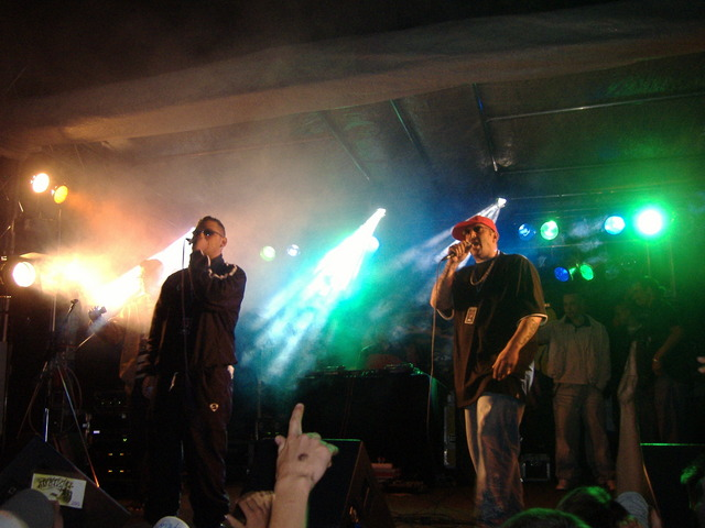 Bass Sultan Hengzt (links), MOK (rechts); Konzertfoto